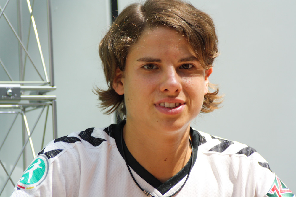 Annike Krahn, Duisburg, FCR 2001 Duisburg